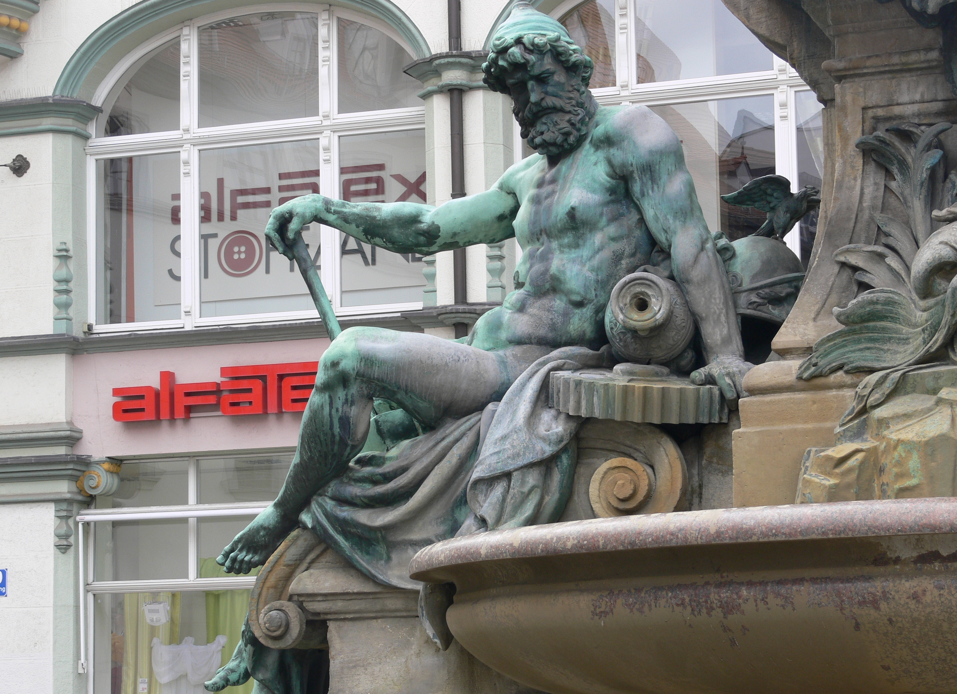 Alter Angerbrunnen am westlichen Ende des Angers in Erfurt Allegorie von Industrie und Gewerbe